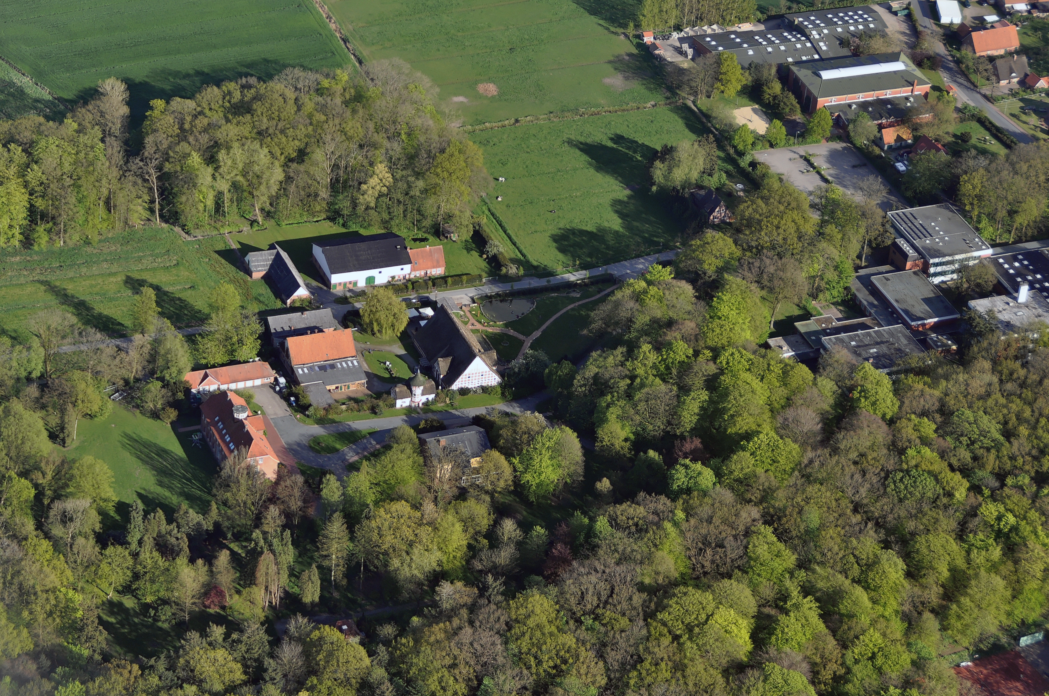 Luftbilder von der Nordseeküste 2012-05